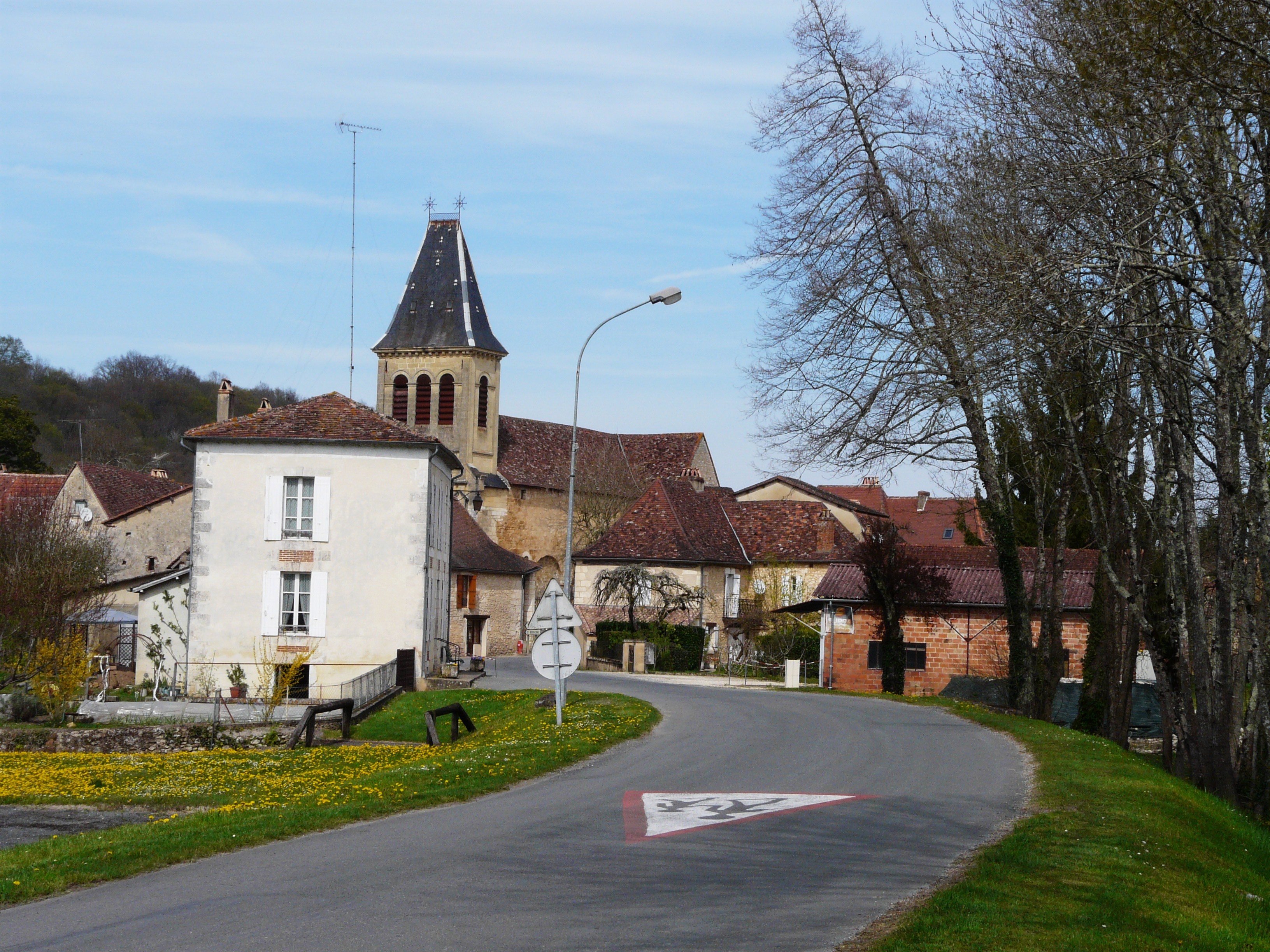 Le village de Lamonzie-Montastruc, Dordogne, France.